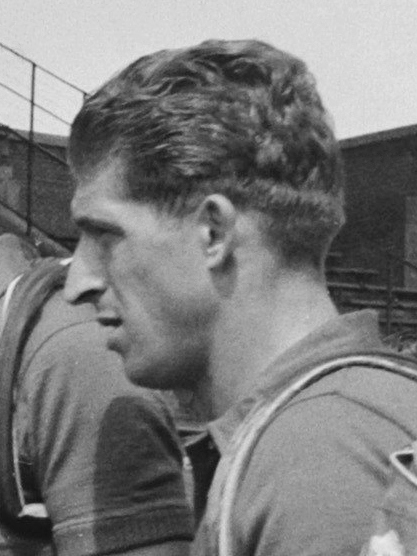 Deelnemers Tour de France, Zwitserse ploeg [Remo Pianezzi] (bike number:59, features)